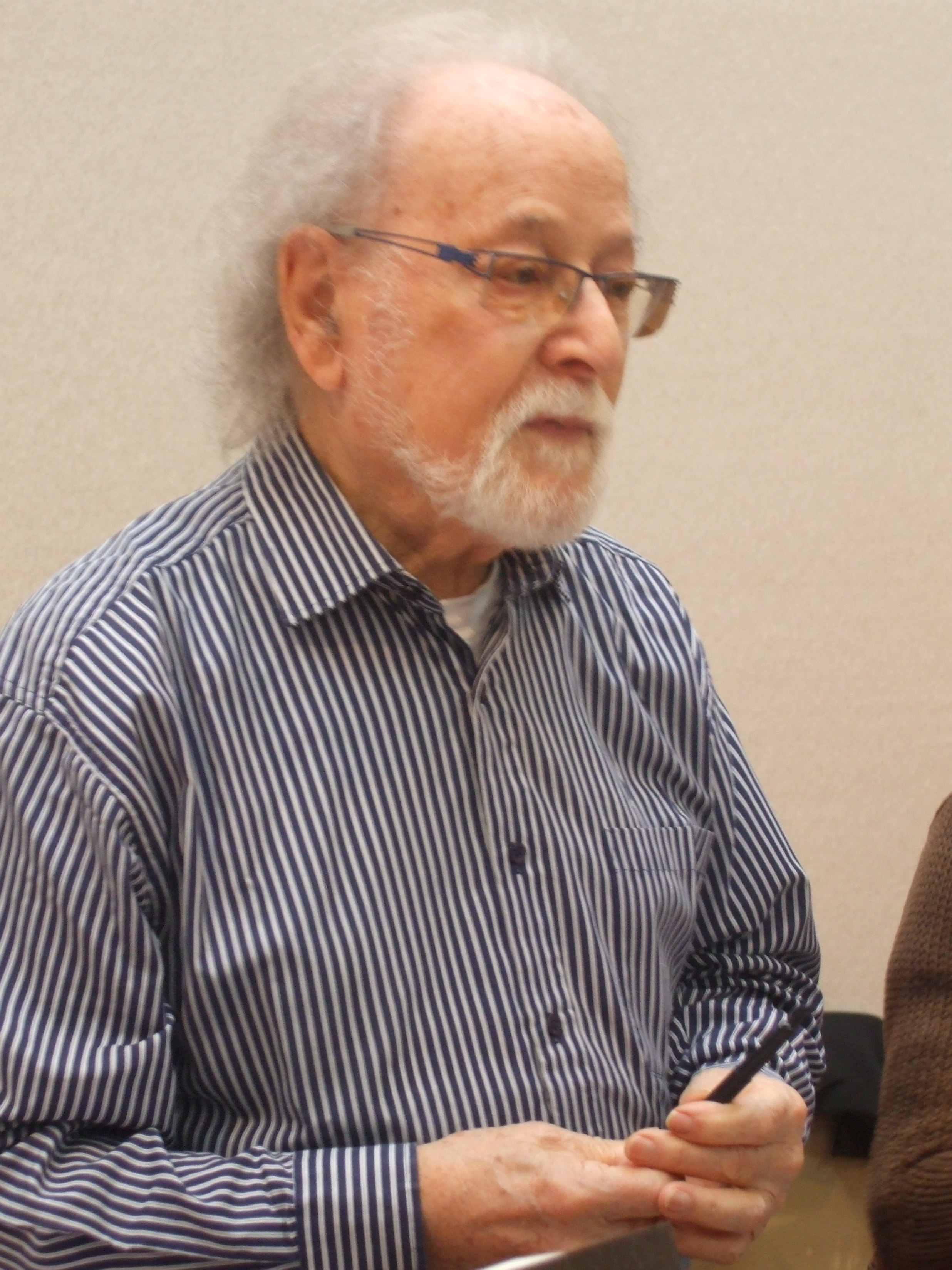 Michel Peyramaure, écrivain français, à la foire du livre de Brive la Gaillarde, France, le 5 novembre 2010